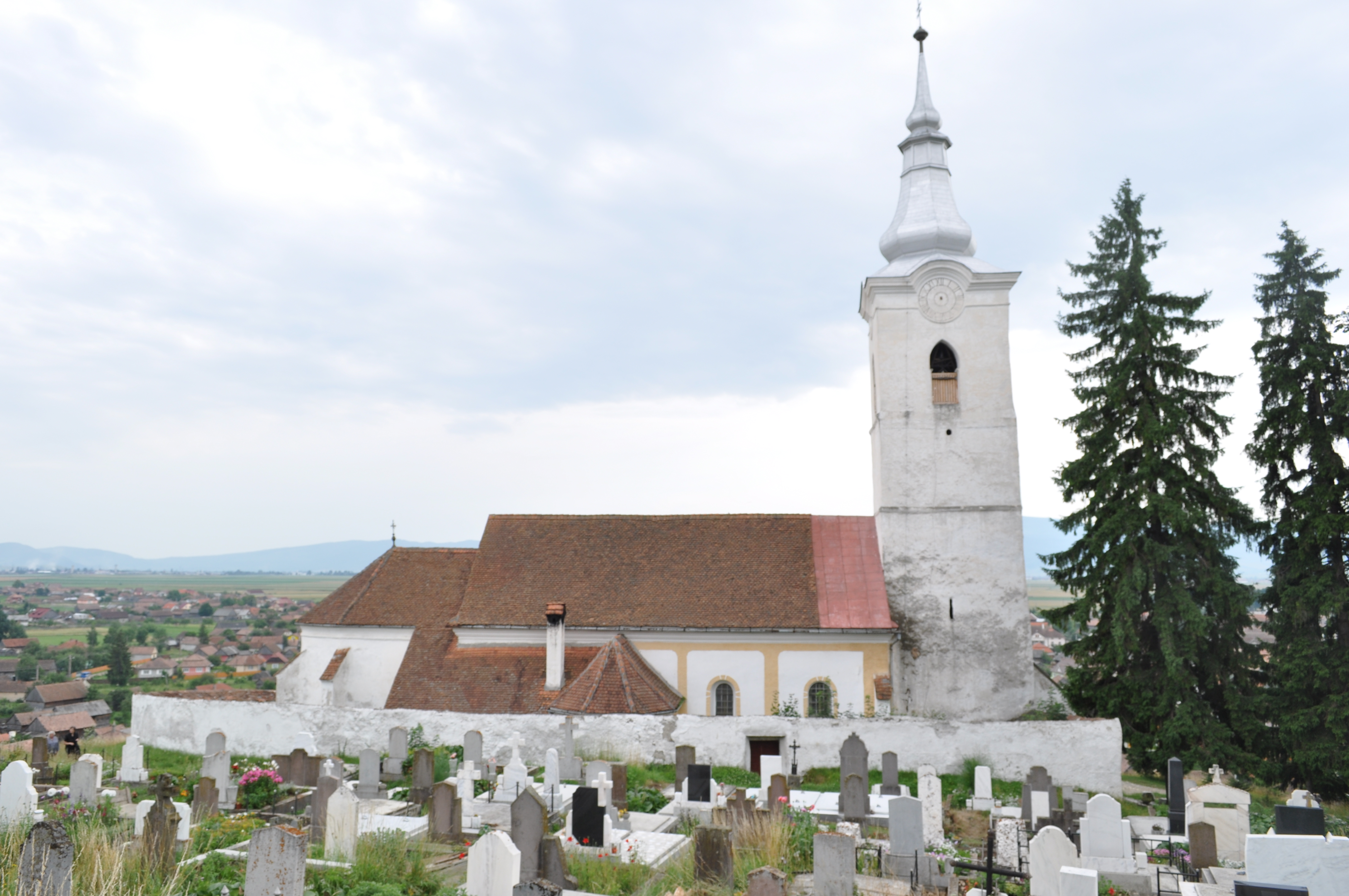 Lăzarea, județul Harghita